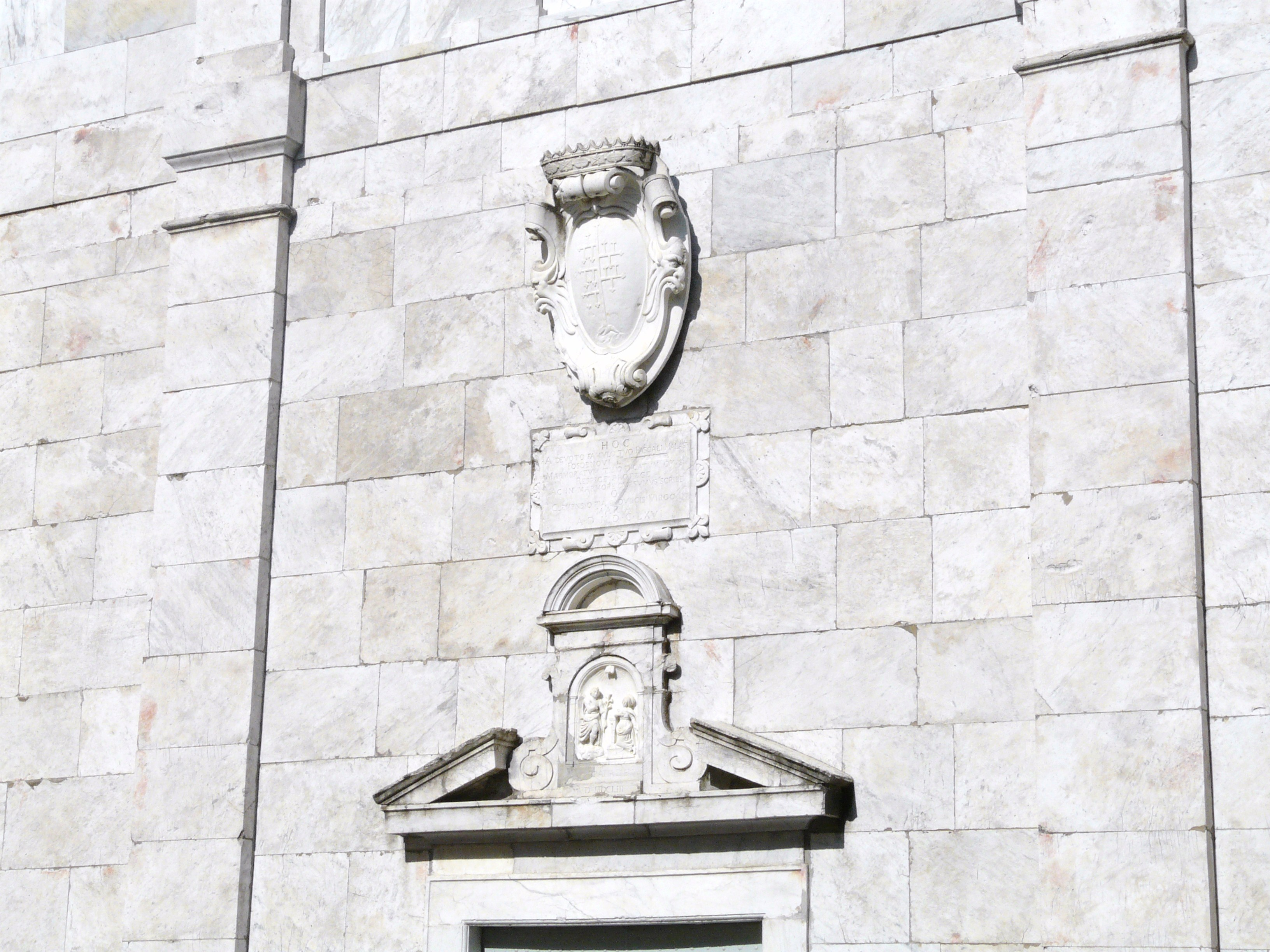 Oratorio dei Bianchi, Fosdinovo, Toscana, Italia